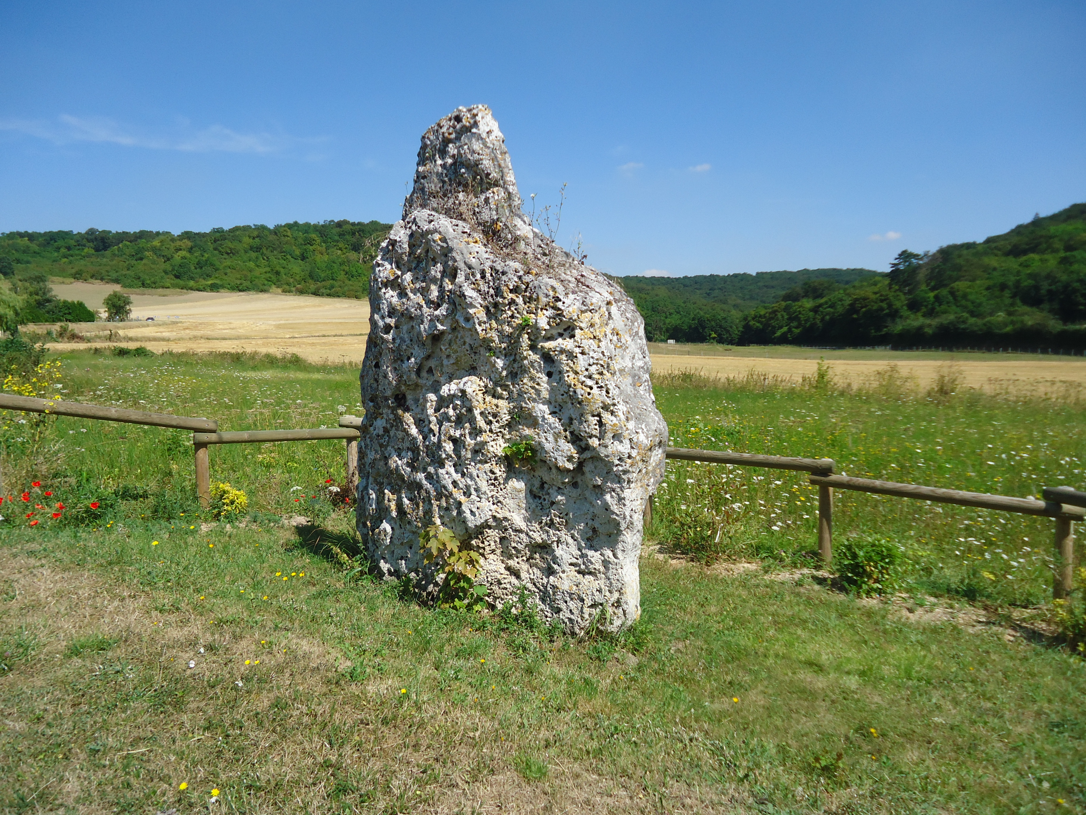 Menhir dit Gravier de Gargantua à Port-Mort dans l'Eure